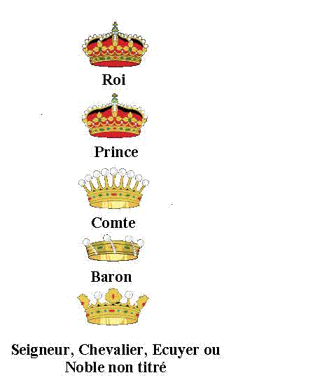 Couronnes d'héraldiques polonaises copiées et remaniées des couronnes héraldiques espagnoles de wikipedia et associées avec des titres de noblesses écrits en times new roman (word).